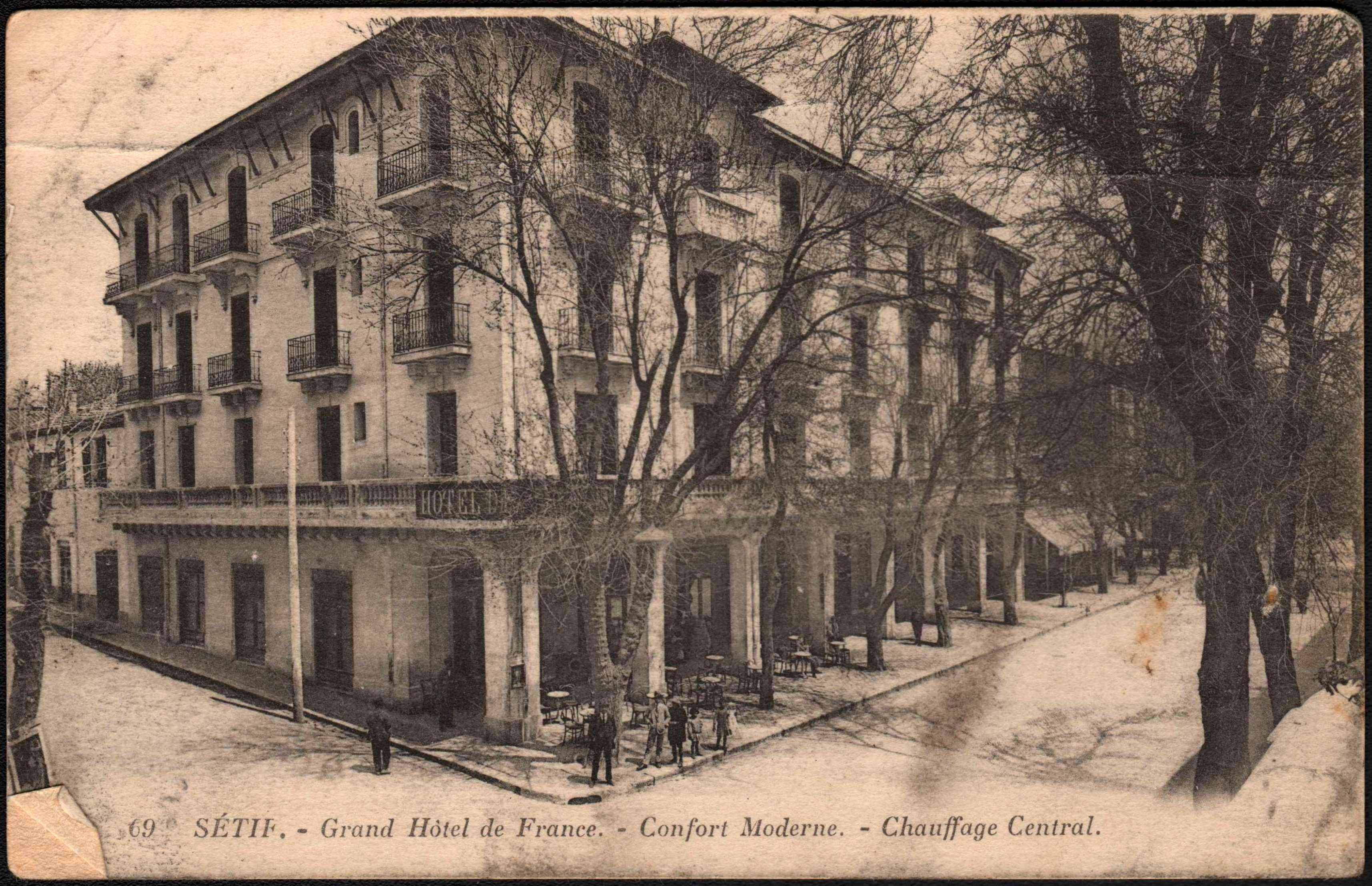 Sétif (Algeria). - Grand Hôtel de France.